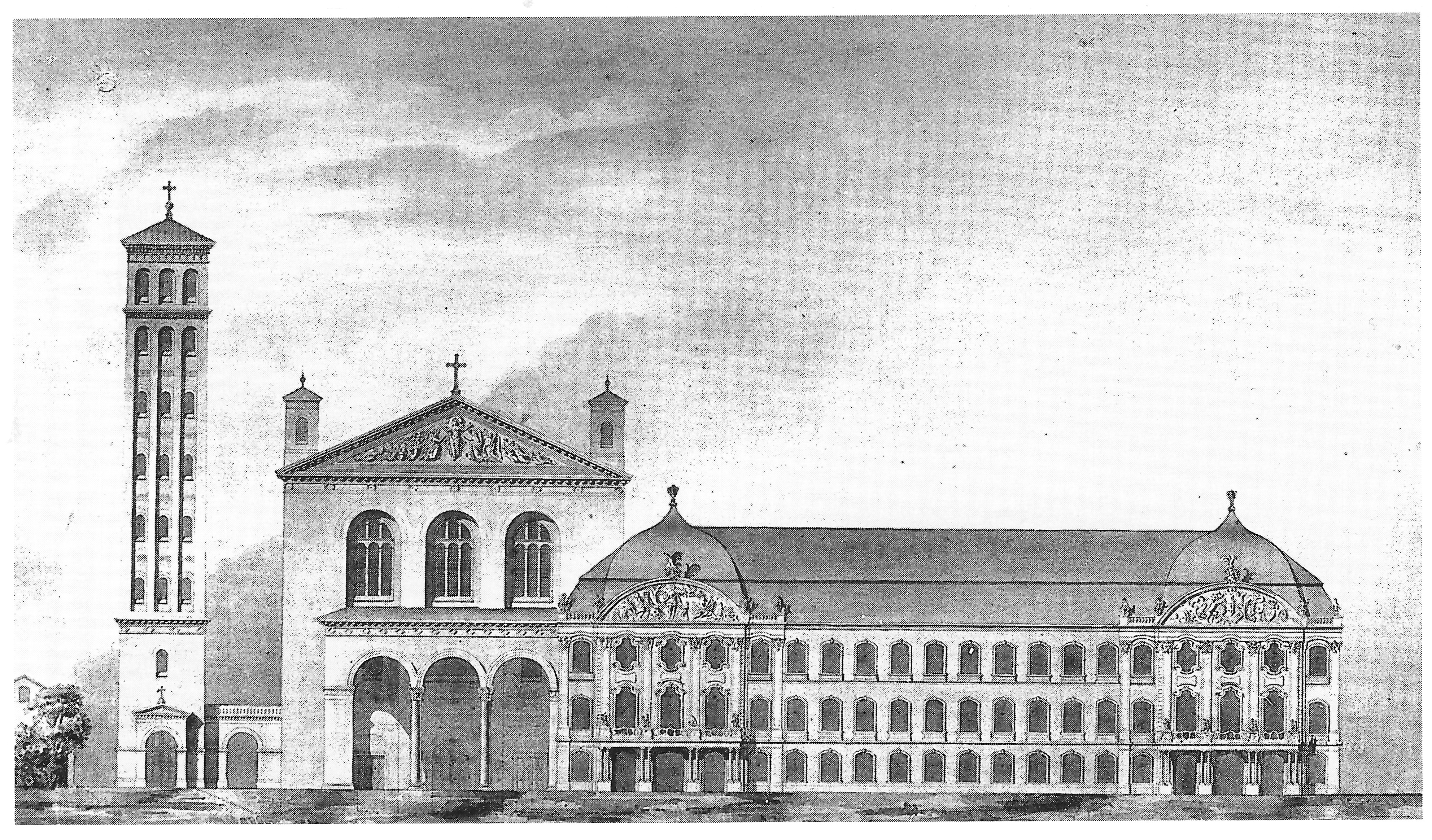 Konstantinbasilika Trier - Entwurf Karl Schnitzler 1850 für die Gestaltung der Südfassade